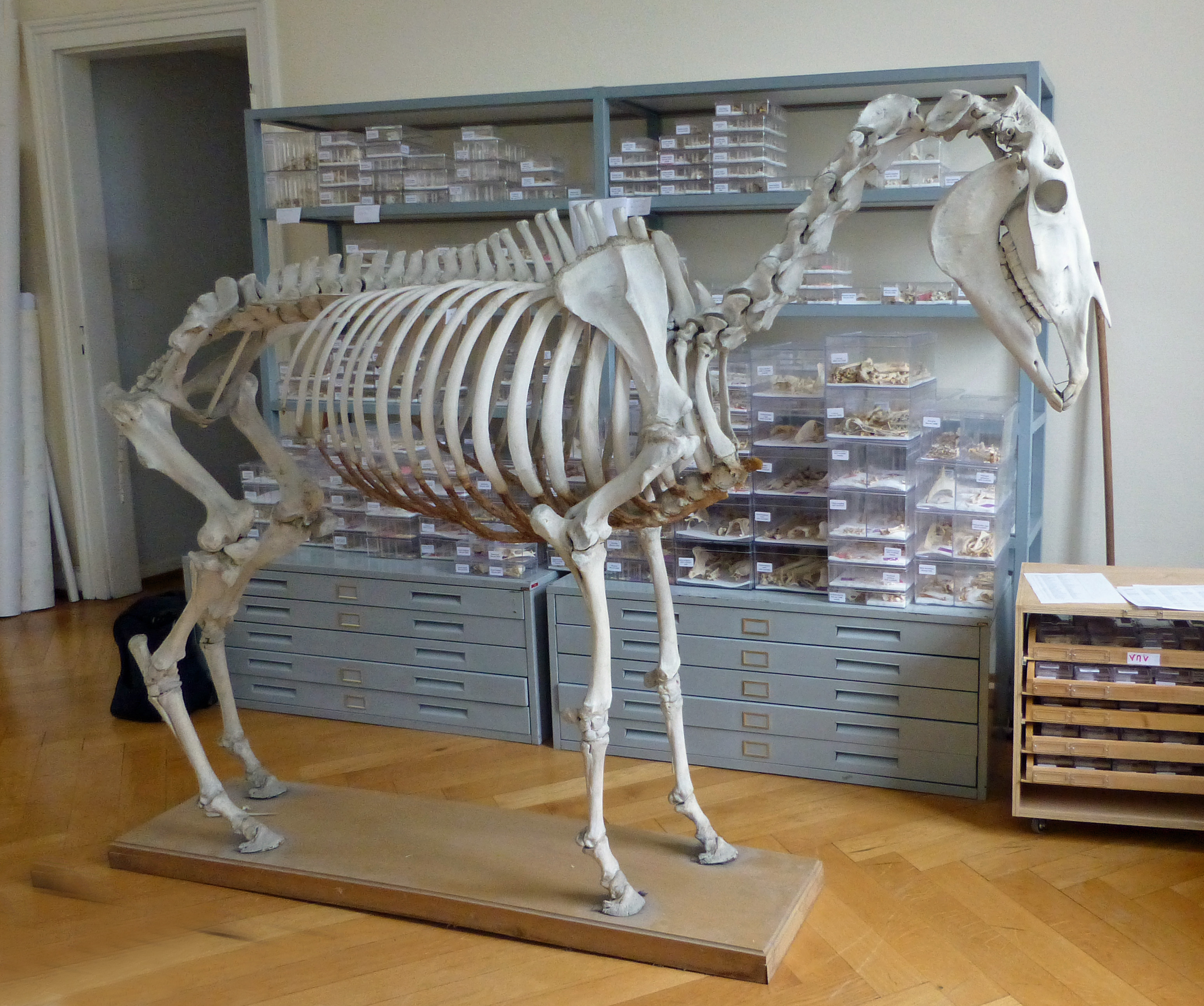 Ostéothèque de Strasbourg, constituée par Rose-Marie Arbogast, archéozoologue, opérationnelle depuis novembre 2009 au Musée zoologique de Strasbourg.